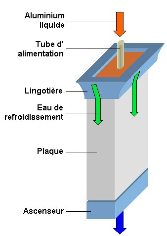 Représentation coulée verticale pour article Fabrication Feuilles et Bandes d'Aluminium. Image créée par Wikifab, libre de droits.